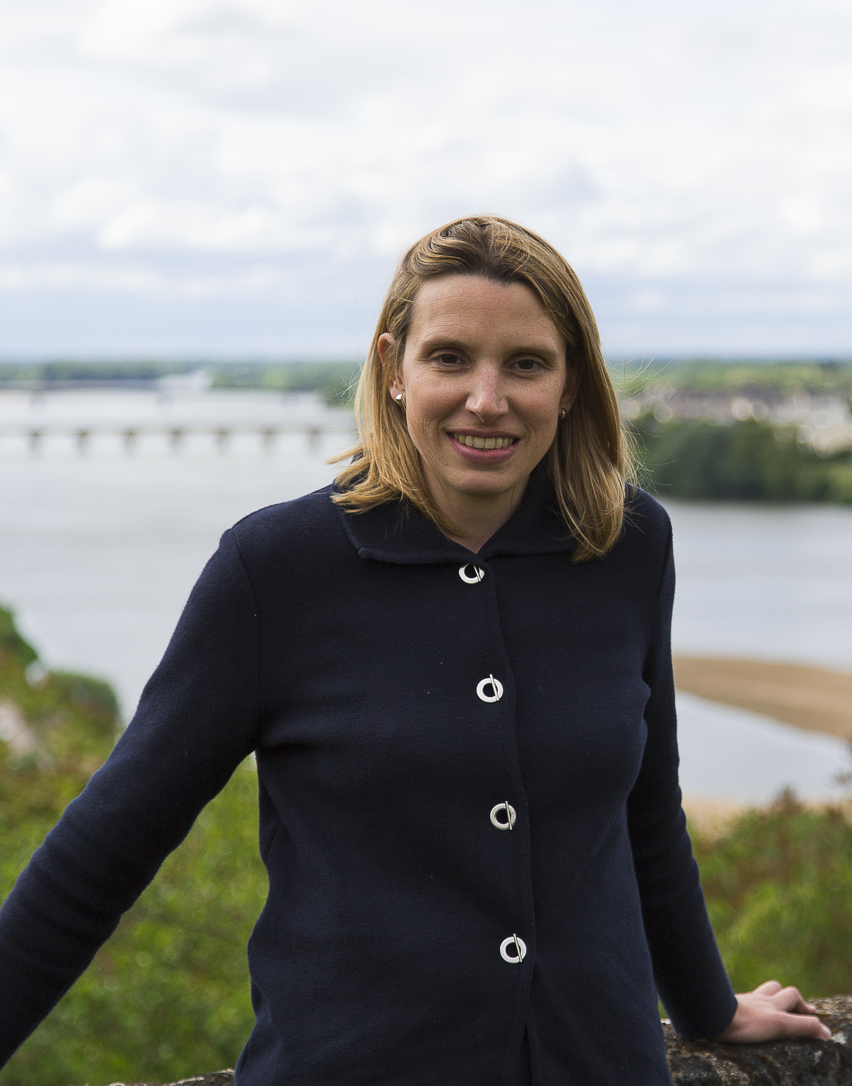 Laetitia Saint Paul devant le pont Cessart de Saumur - Mai 2017